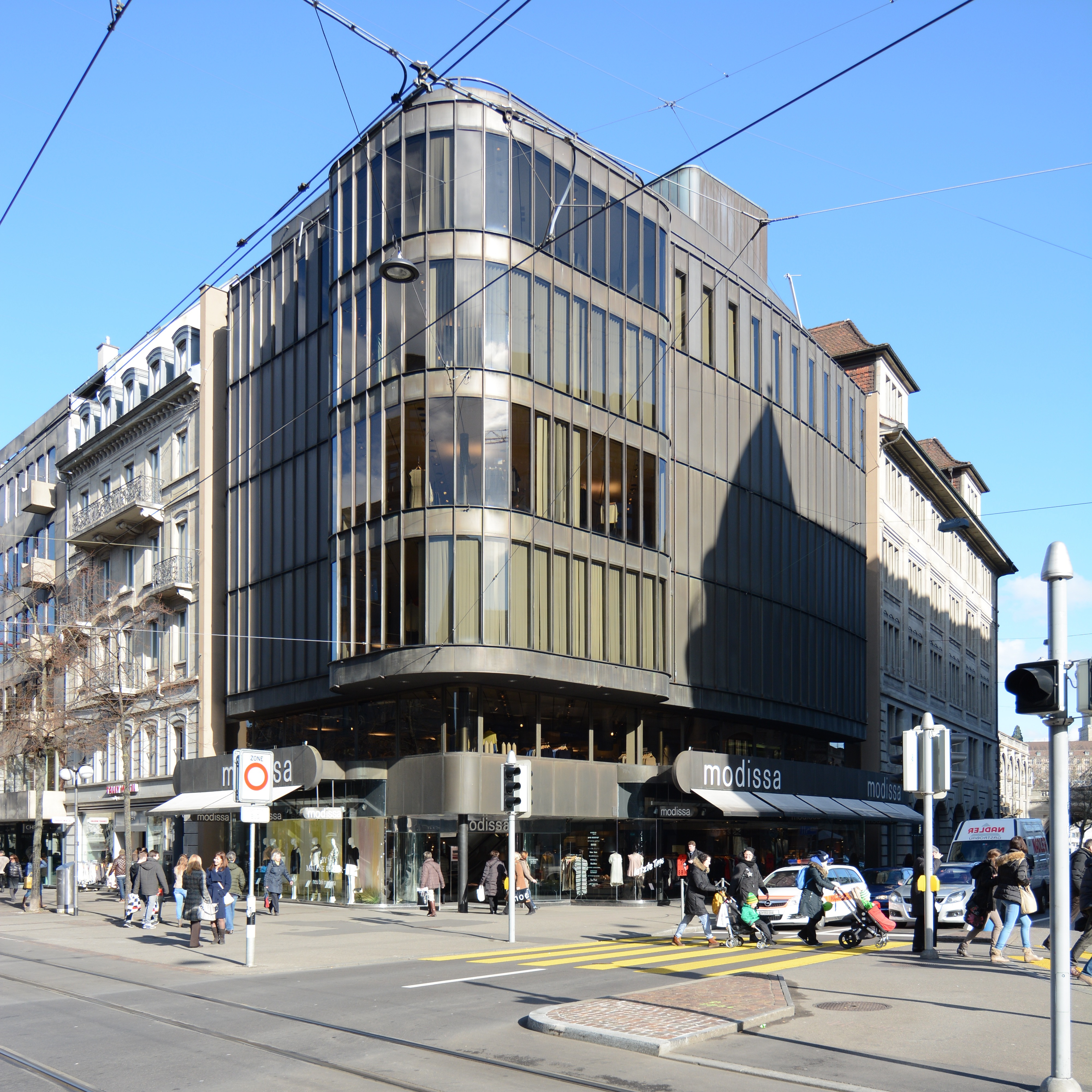 BP-Hauptsitz, Zürich, 1975. Architekt: Werner Gantenbein